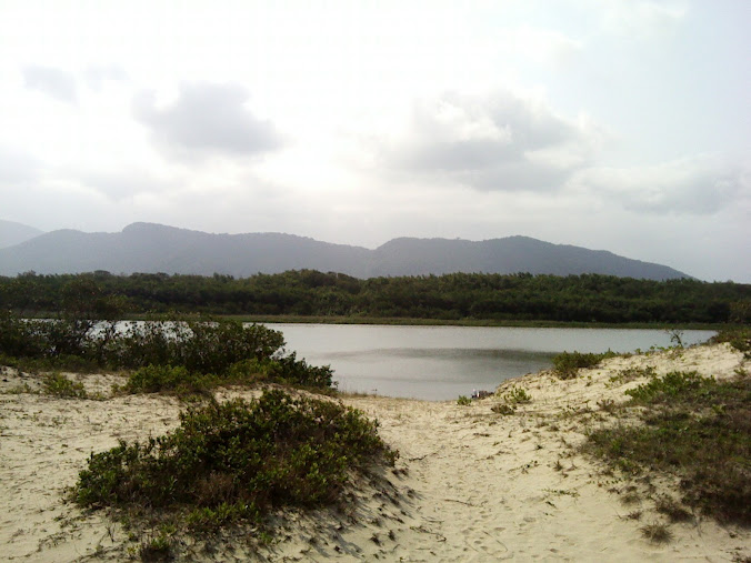 Vista do Mar Pequeno a partir das dunas do Araçá.